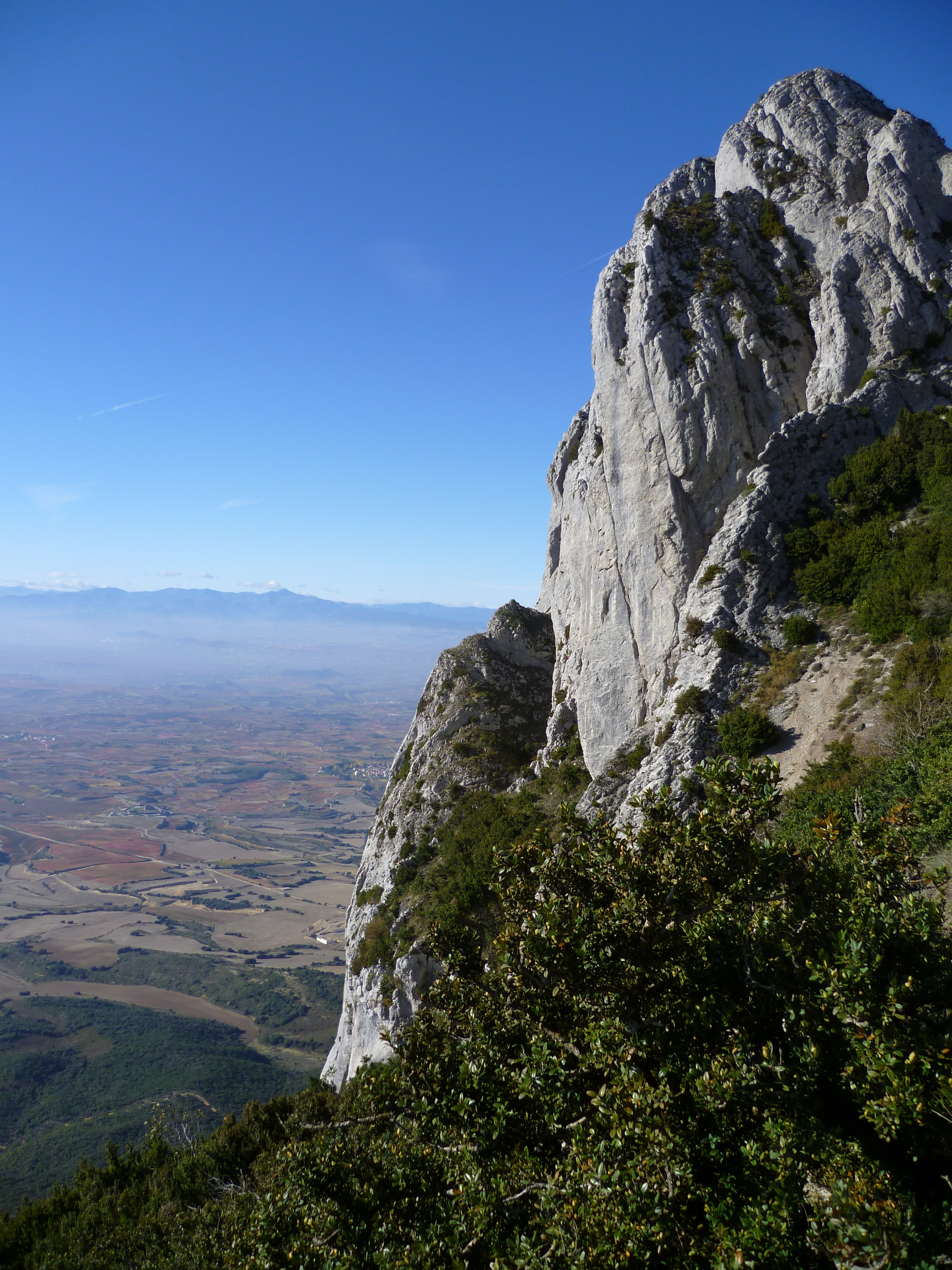 Obarenes-Sierra de Cantabria This is a photography of a Site of Community Importance in Spain with the ID: ES0000062. Natura2000 entry, EEA entry